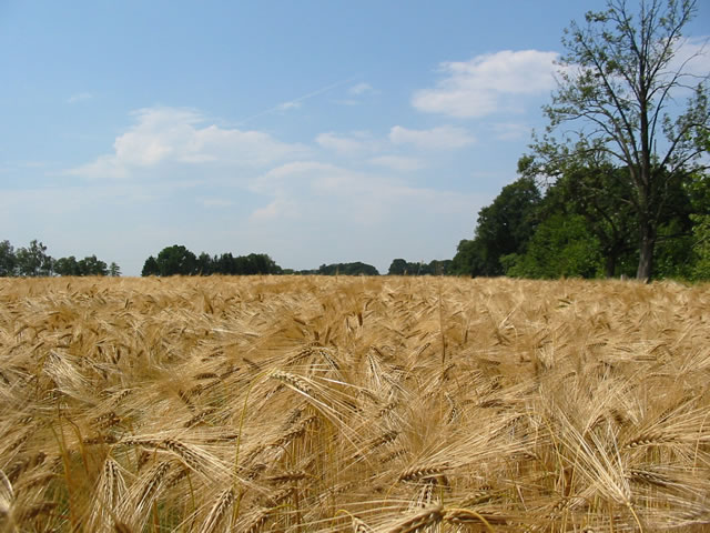 Gerstenfeld in Koelkebeck bei Halle Westfalen